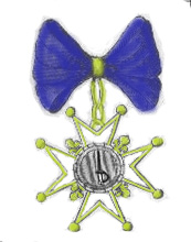 institution du mérite_militaire_institué par Louis_XV_pour les protestants; au centre est une épée dressée entourée de Pro virtute bellica (pour les vertus guerrières).